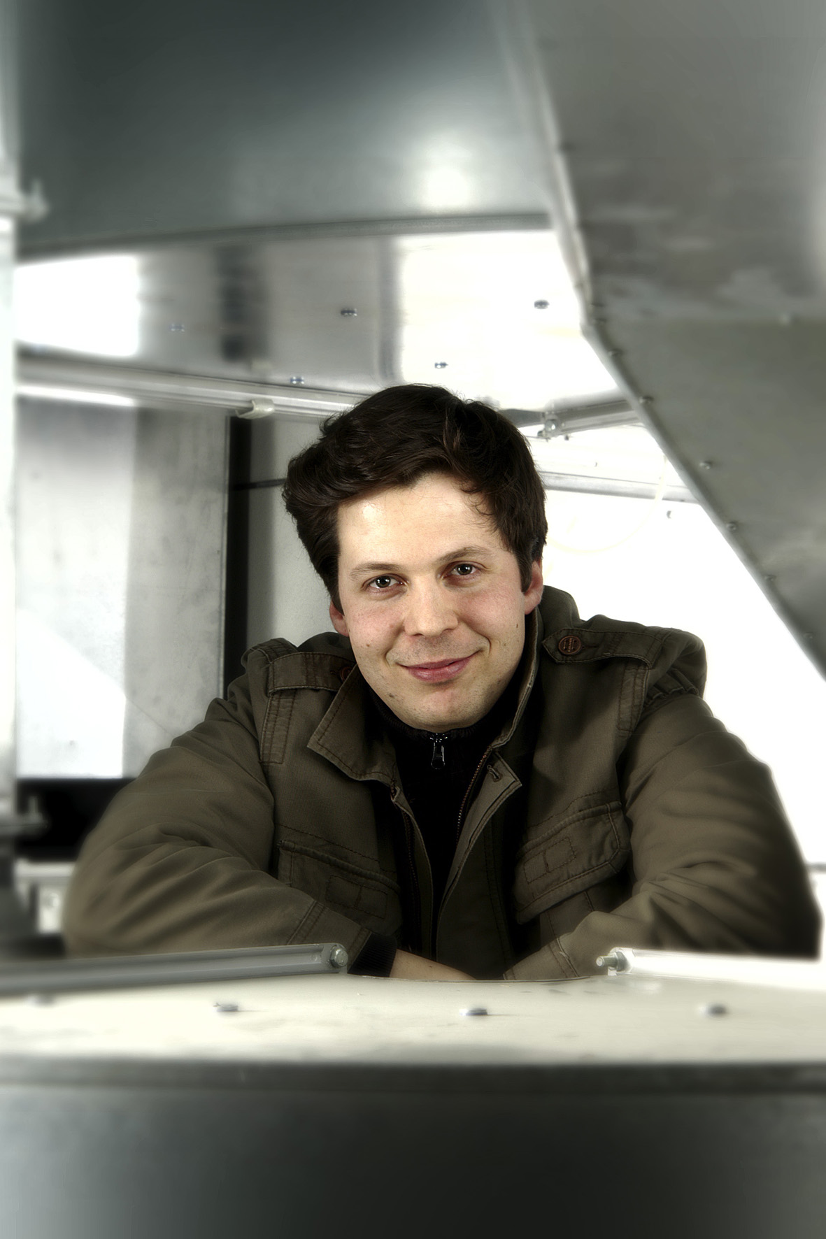 Tobi Hofmann Fotograf: Klaus Junk, OEW Medientechnik München Datum der Aufnahme: 9.3.2006 Sowohl Tobi Hofmann als auch der Fotograf Klaus Junk haben der Veröffentlichung des Fotos unter der GNU-Lizenz für freie Dokumentation ausdrücklich zugestimmt.